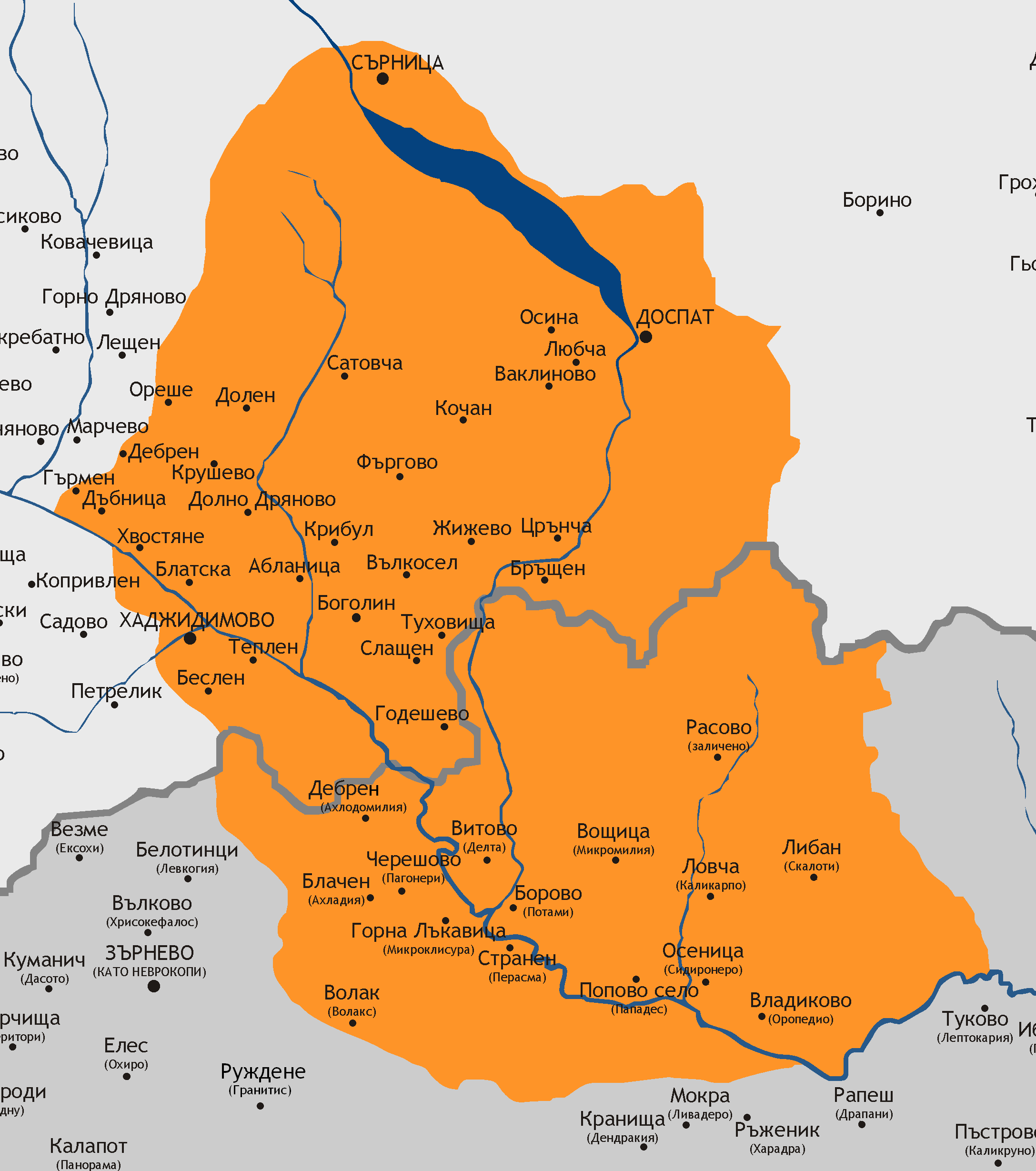 Карта на Чеч